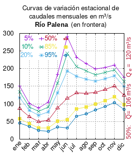 Caudales según Probabilidad de Excedencia del río Palena en la frontera. # cita publicación # | apellido = Dirección General de Aguas # | nombre = # | enlace-autor = Ministerio de Obras Públicas (Chile) # | título = Reserva del río Palena para la conservación ambiental y el desarrollo local de la cuenca # | ubicación = # | editorial = # | año = 2009 # | edición = # | url = # | urlarchivo = # | fechaarchivo = # | ref = harv # Tabla 8. Caudales Mensuales (m3/s) según Distintas Probabilidades de Excedencia. Estación Palena en la Frontera. pág. 43 mes 5% 10% 20% 50% 85% 95% ene 150.496 134.651 116.959 87.505 58.651 45.208 feb 101.467 91.922 81.168 62.966 44.590 35.730 mar 88.280 78.504 67.636 49.691 32.379 24.455 abr 105.380 91.866 77.058 53.261 31.474 22.115 may 183.466 158.811 131.933 89.162 50.765 34.676 jun 290.520 243.249 192.938 116.627 54.671 32.005 jul 231.877 206.275 177.808 130.777 85.363 64.556 ago 214.338 193.395 169.869 130.259 90.652 71.761 sep 199.274 183.057 164.602 132.793 99.634 83.077 oct 203.800 188.715 171.447 141.379 109.476 93.244 nov 210.383 196.104 179.681 150.841 119.800 103.770 dic 175.704 163.343 149.153 124.320 97.744 84.101